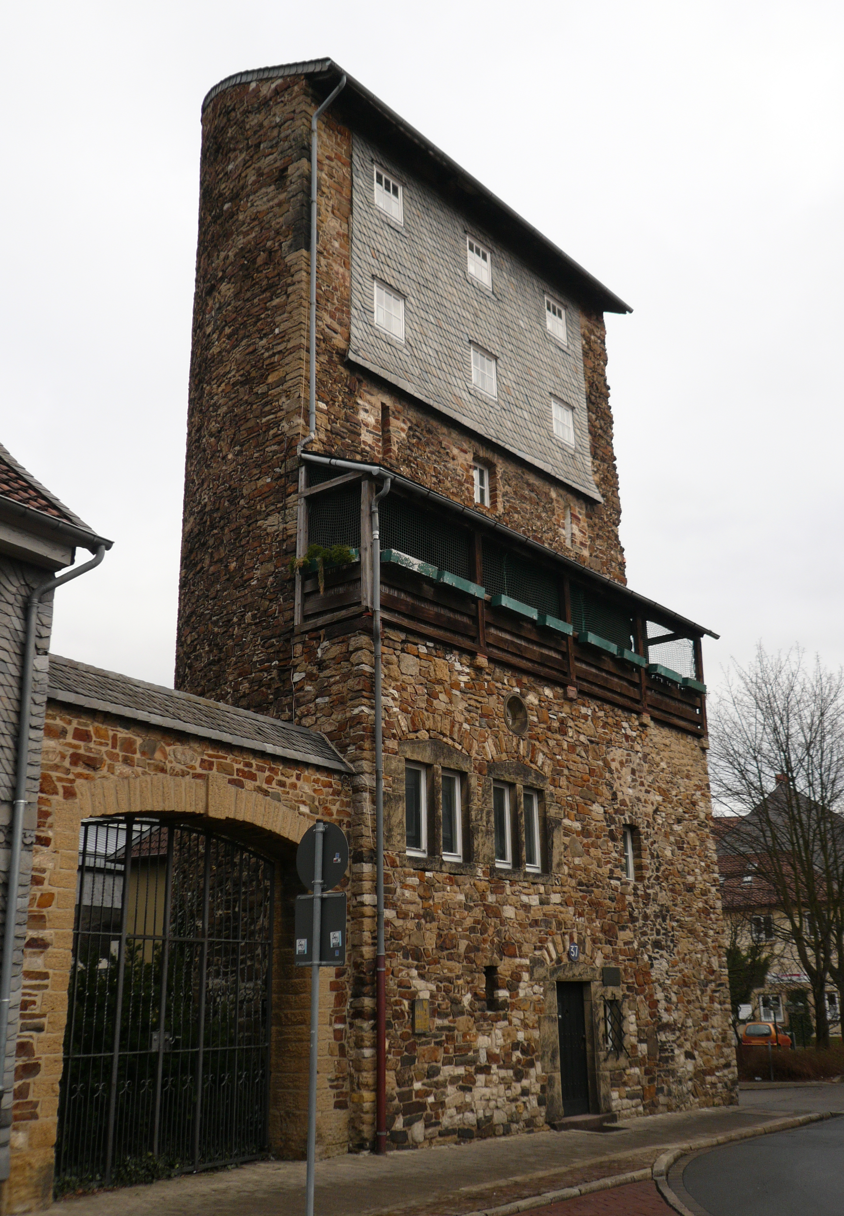 Weberturm in Goslar